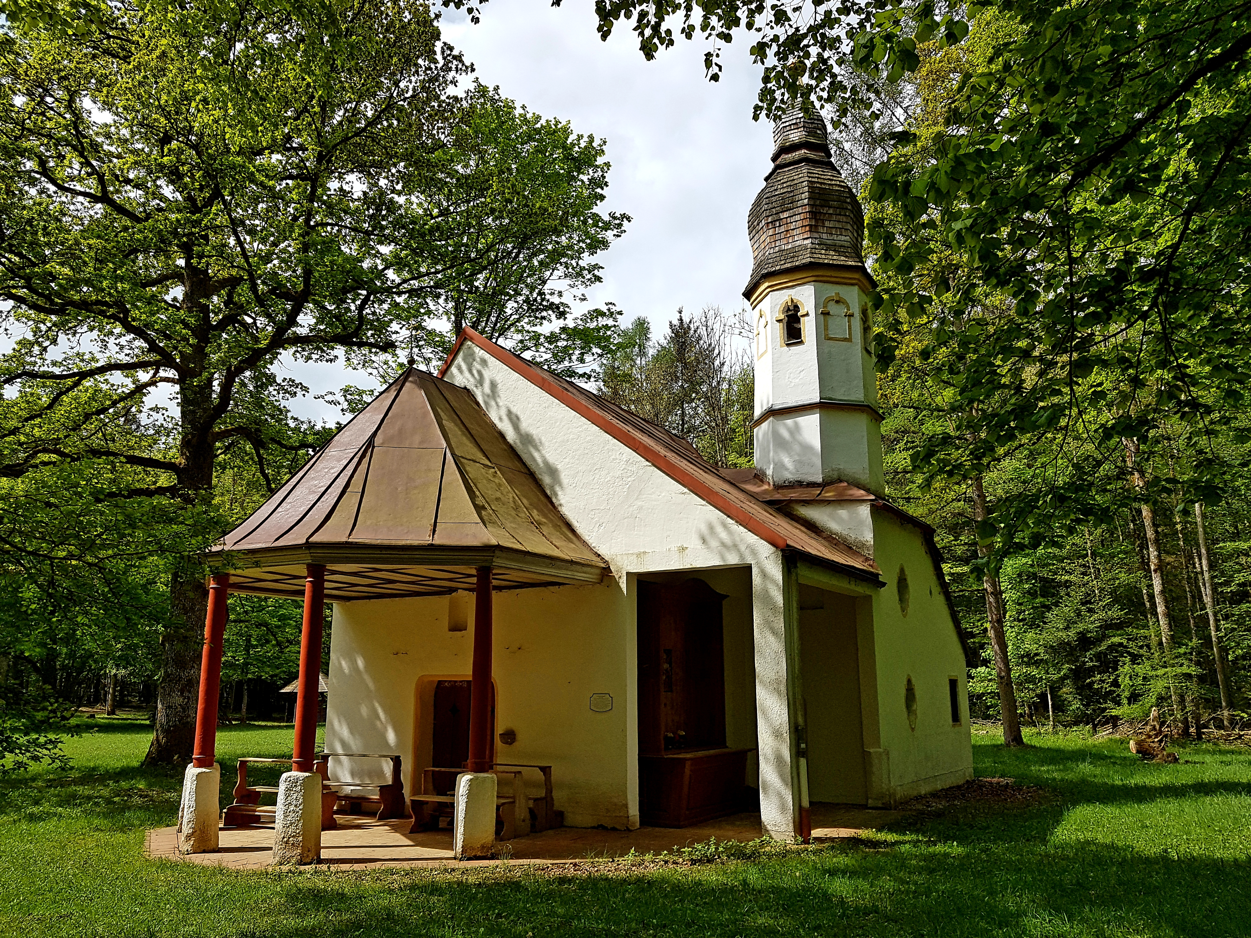 Straucharting (Sauerlach), St. Anna-Kapelle, spätbarocker Bau von 1692/93 der um 1701 erweitert wurde. Um die Kapelle lagen bis 1856 3 Höfe und 2 Huben (Schwaige Straucharting).